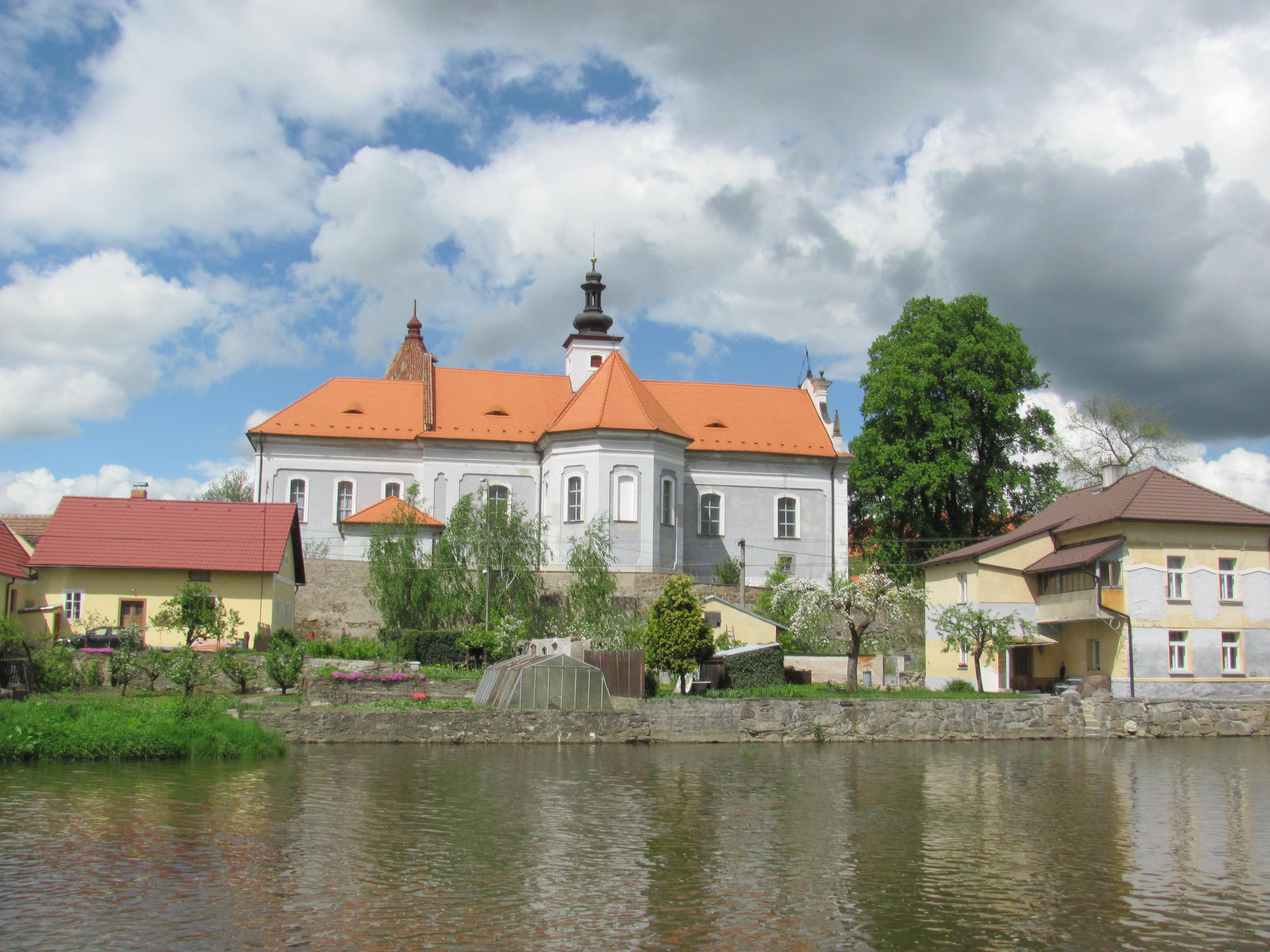 Kostel Svatého Klimenta v Mirovicích (Písek)